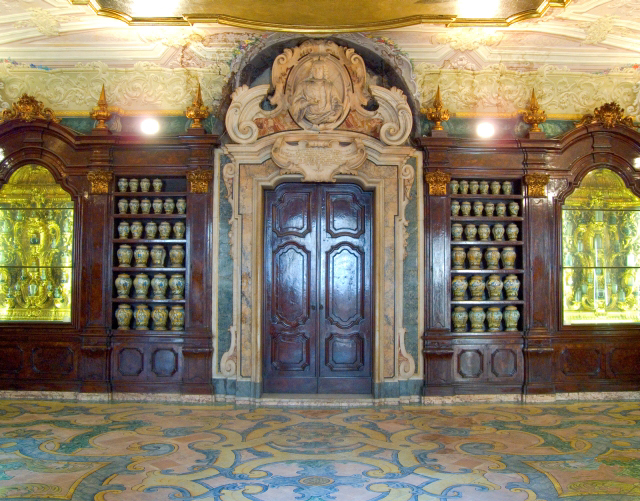 Farmacia degli Incurabili (Napoli)